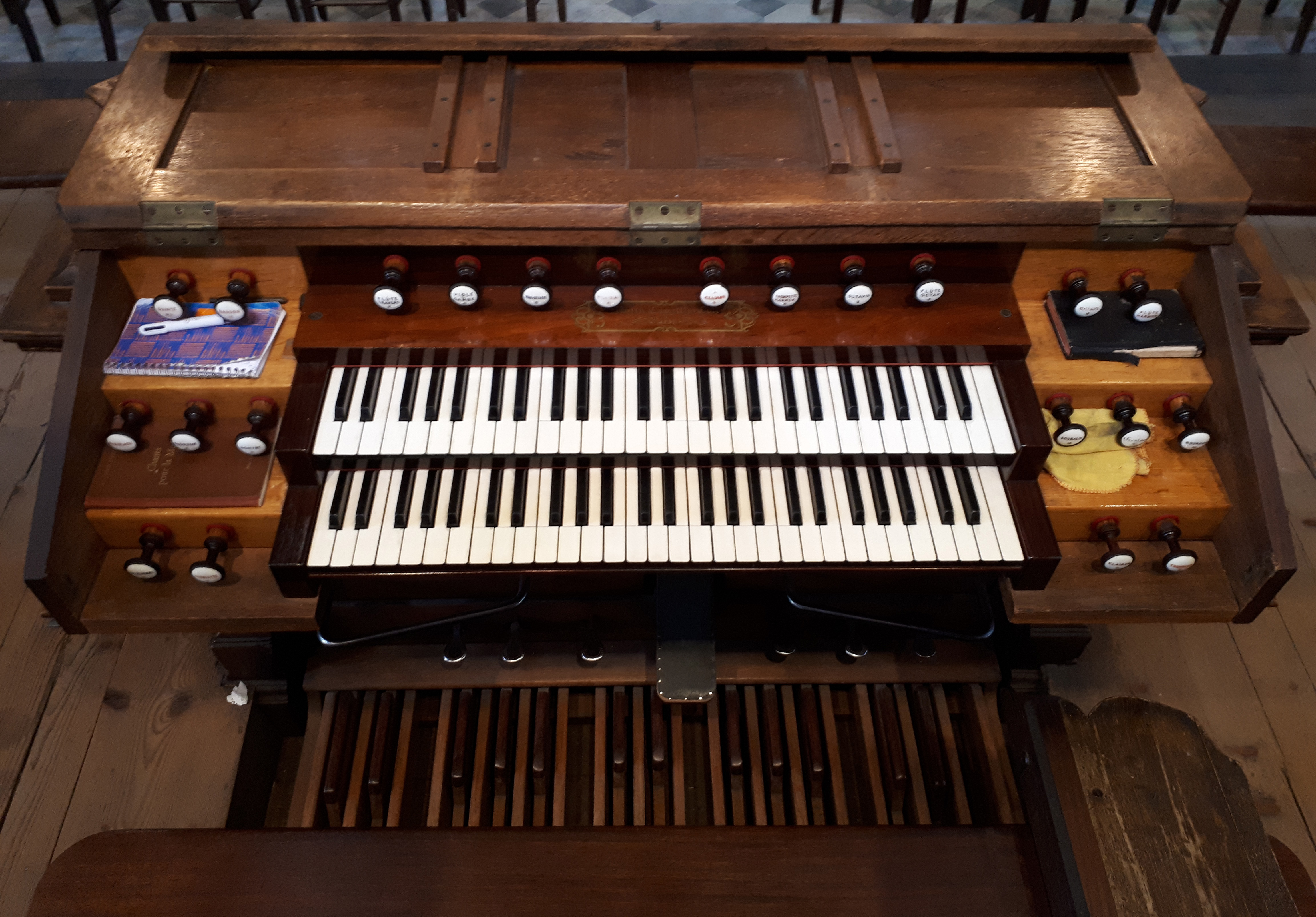 La consolle